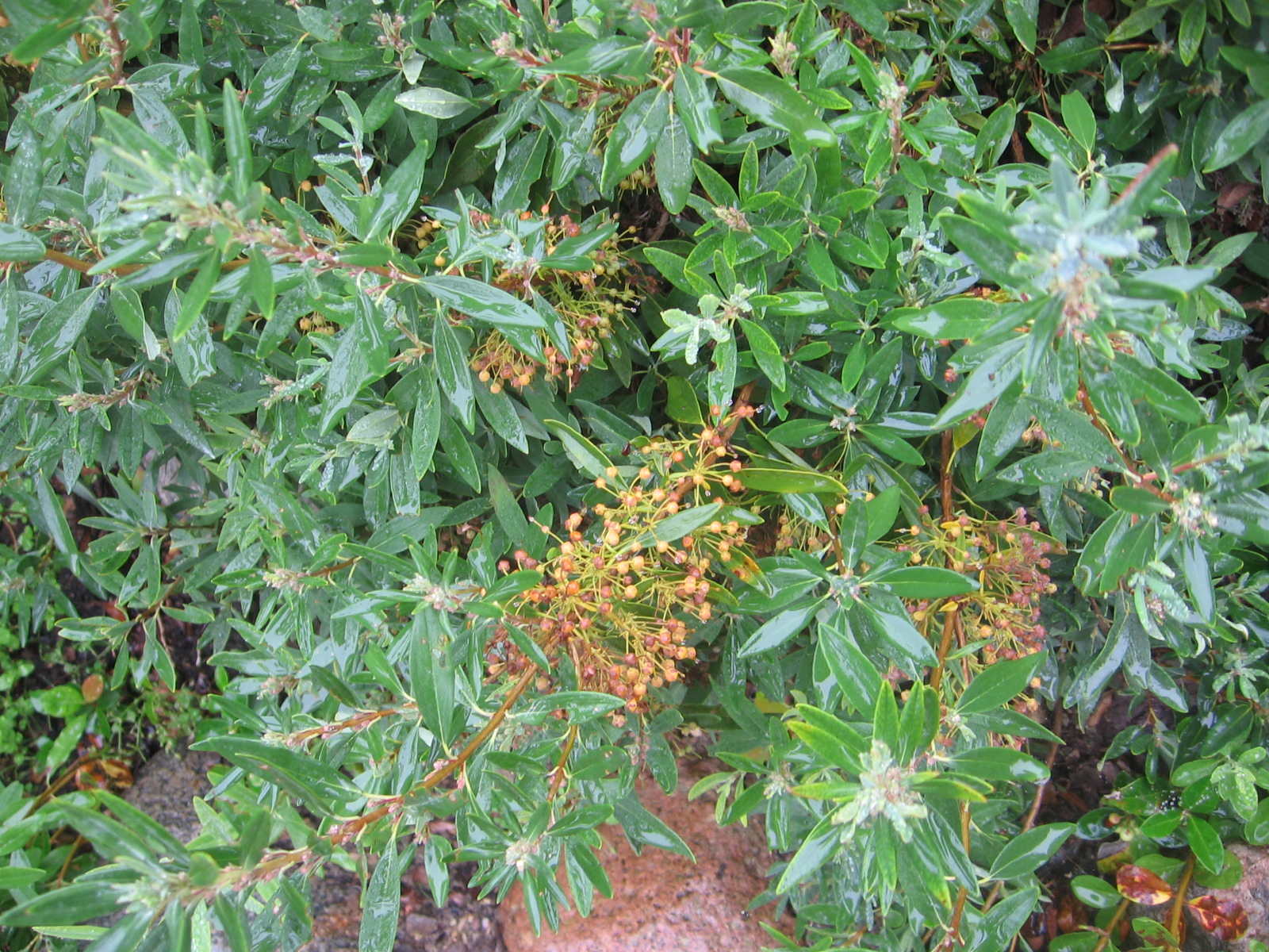 Плоды и листья кальмии узколистной в Ботаническом саду Вильнюсского университета.